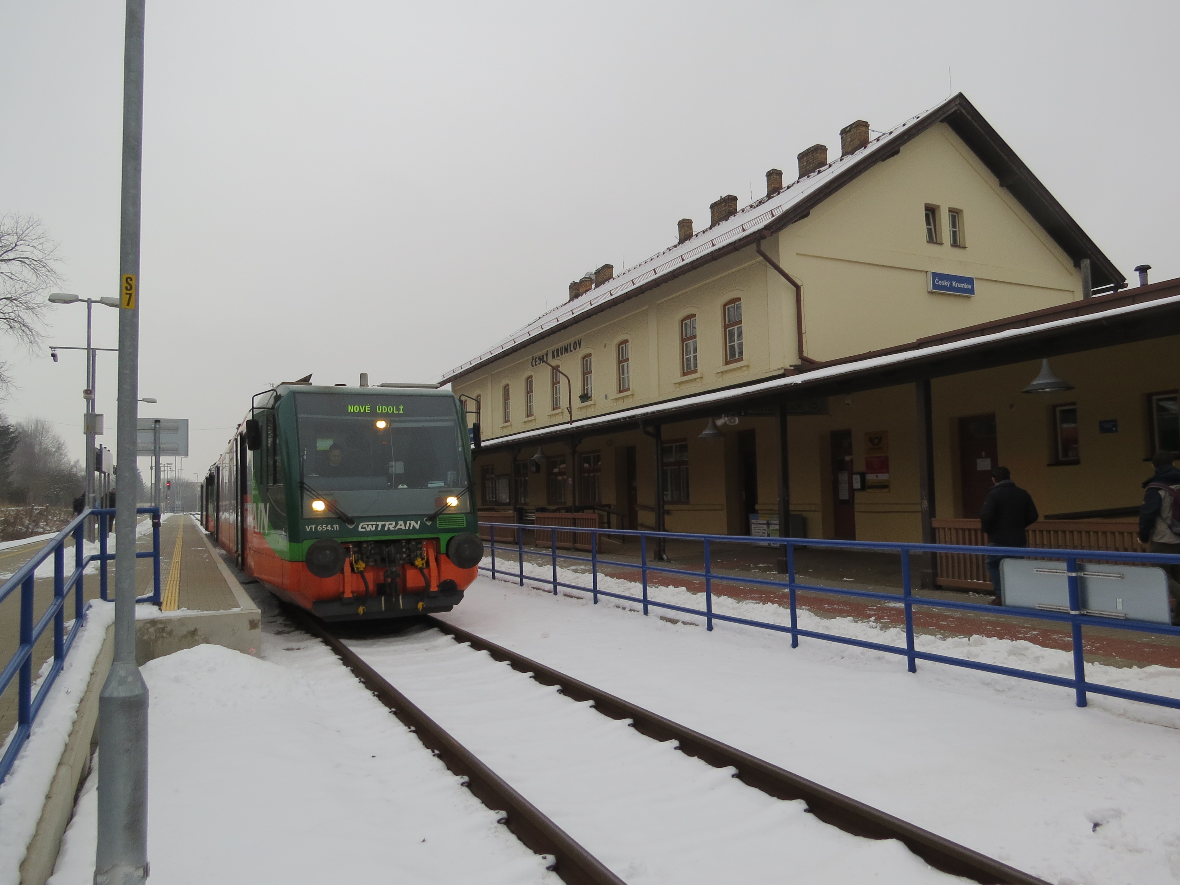 Frankenfels - Südböhmen